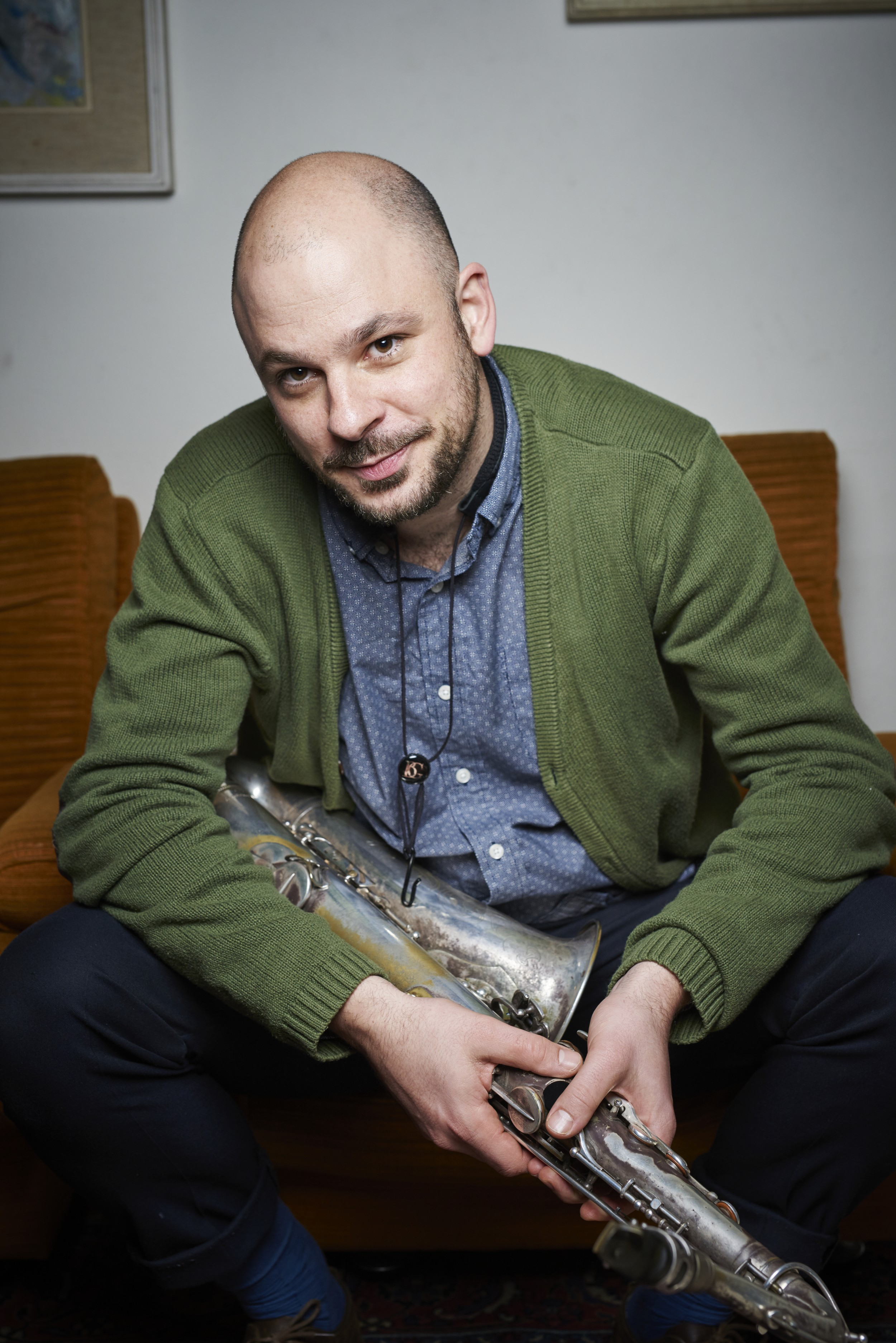 Christoph Irniger 2016